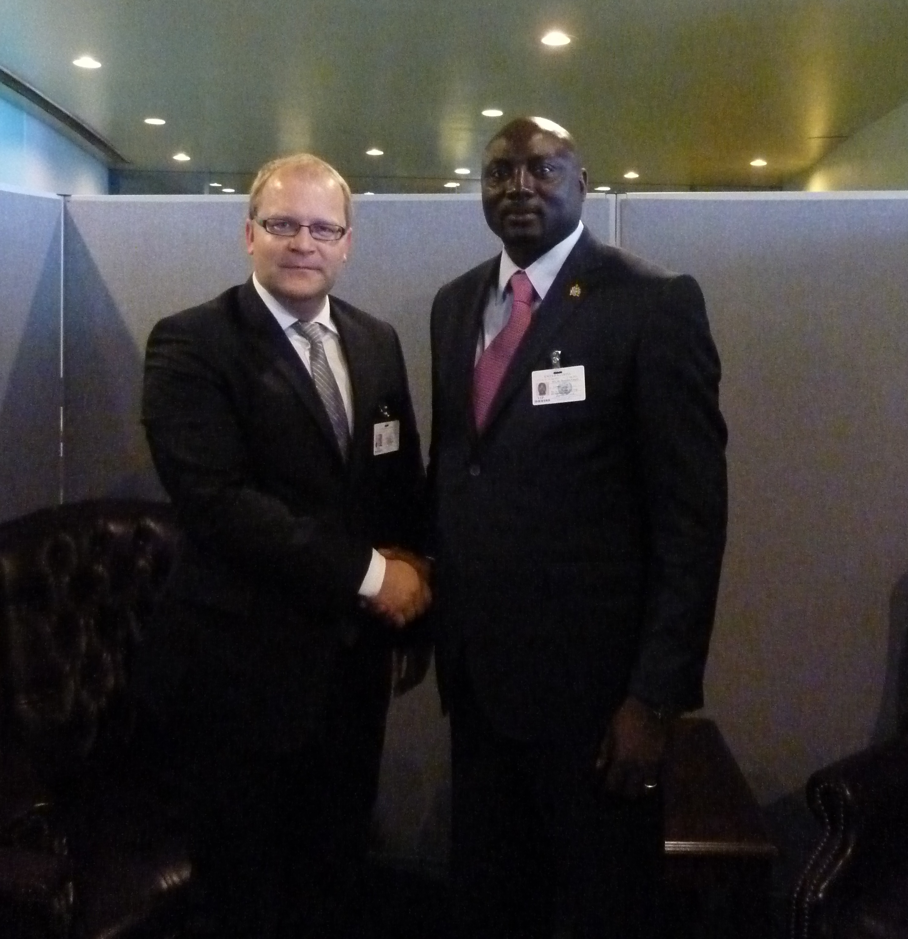 Välisminister Urmas Paeti kohtumine Gambia välisministri Mamadou Tangaraga ÜRO peaassambleel